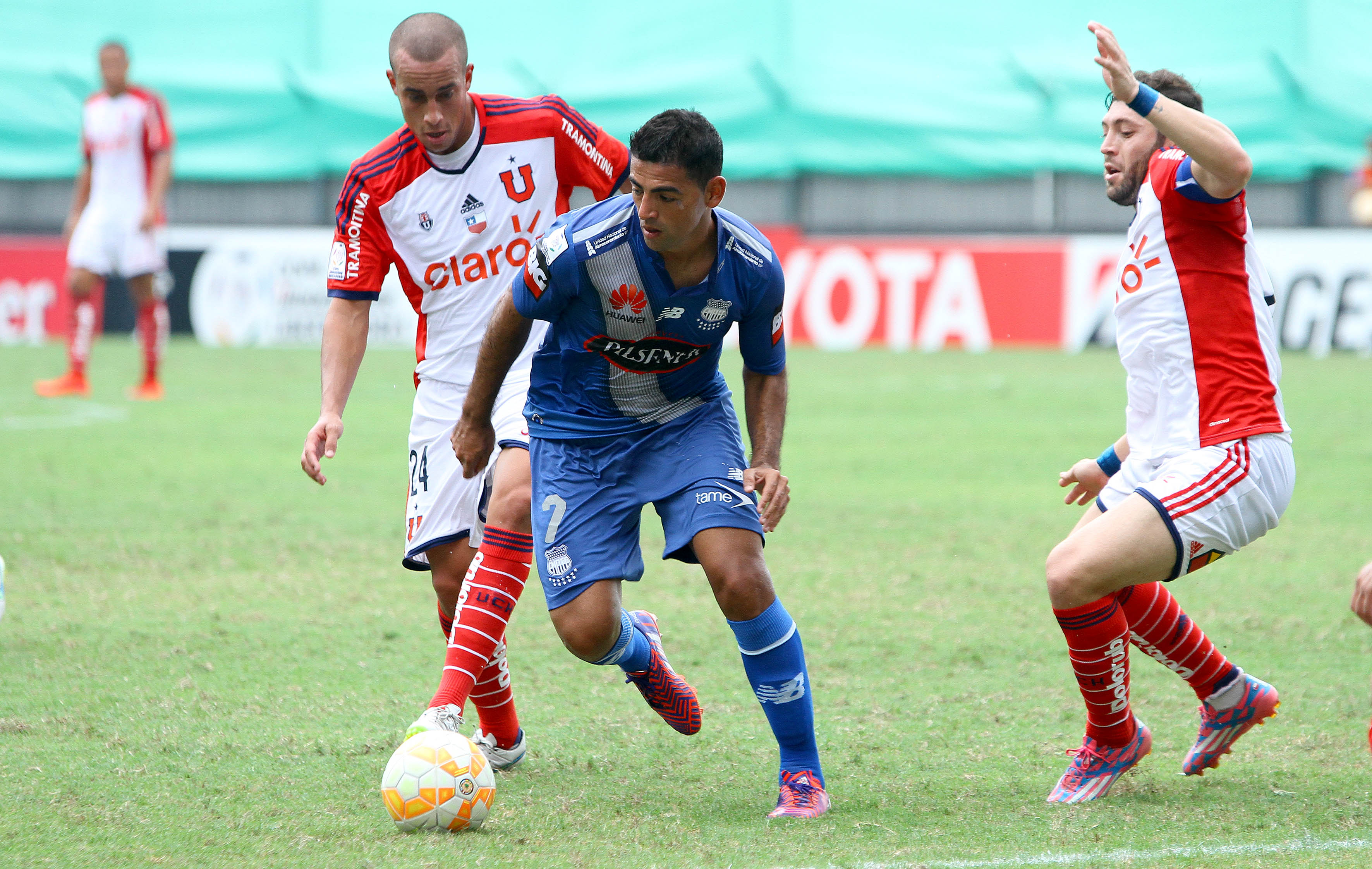 Guayaquil, 22 de abr (Andes).-Emelec gana 2x0 a la Universidad de Chile y clasifica a los octavos de la Copa Libertadores, en la gráfica Miguel Escalada de Emelec es marcado por Ricardo Guzman (24) Foto:César Muñoz/Andes